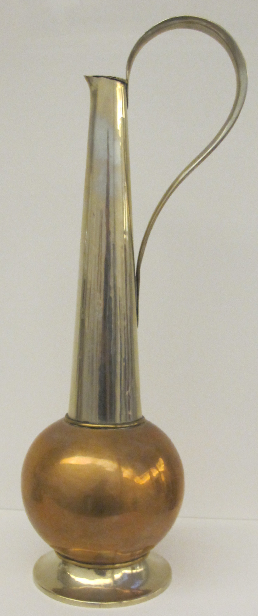 Gyula Pap: Hohe Kanne mit langem engem Hals, 1922. Bronze und Neusilber. Schlossmuseum Weimar.